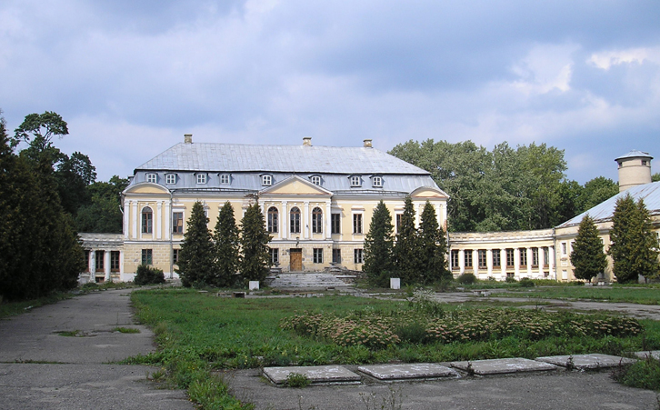 Беларуская (тарашкевіца): Сьвяцак